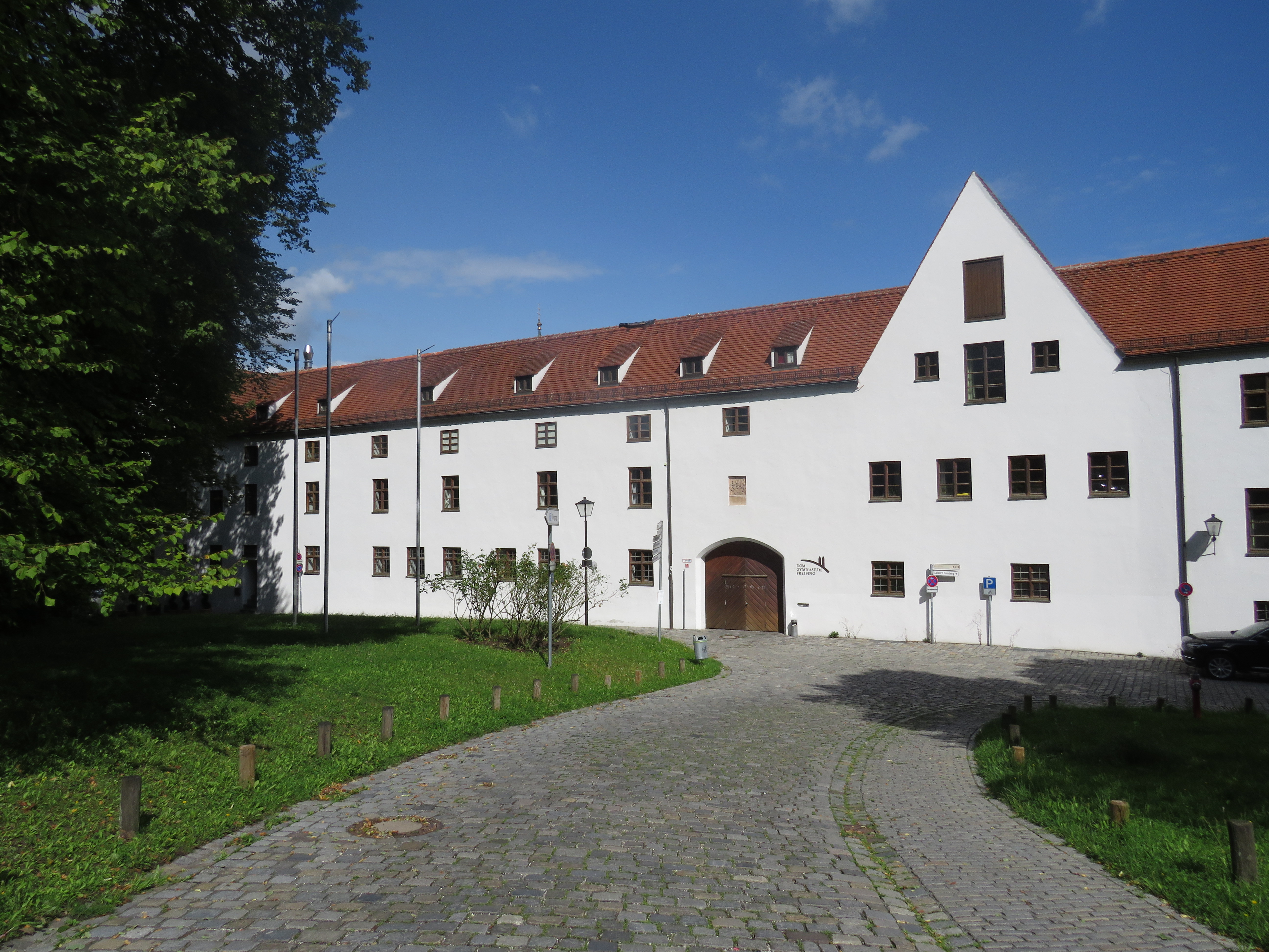 Domgymnasium Freising